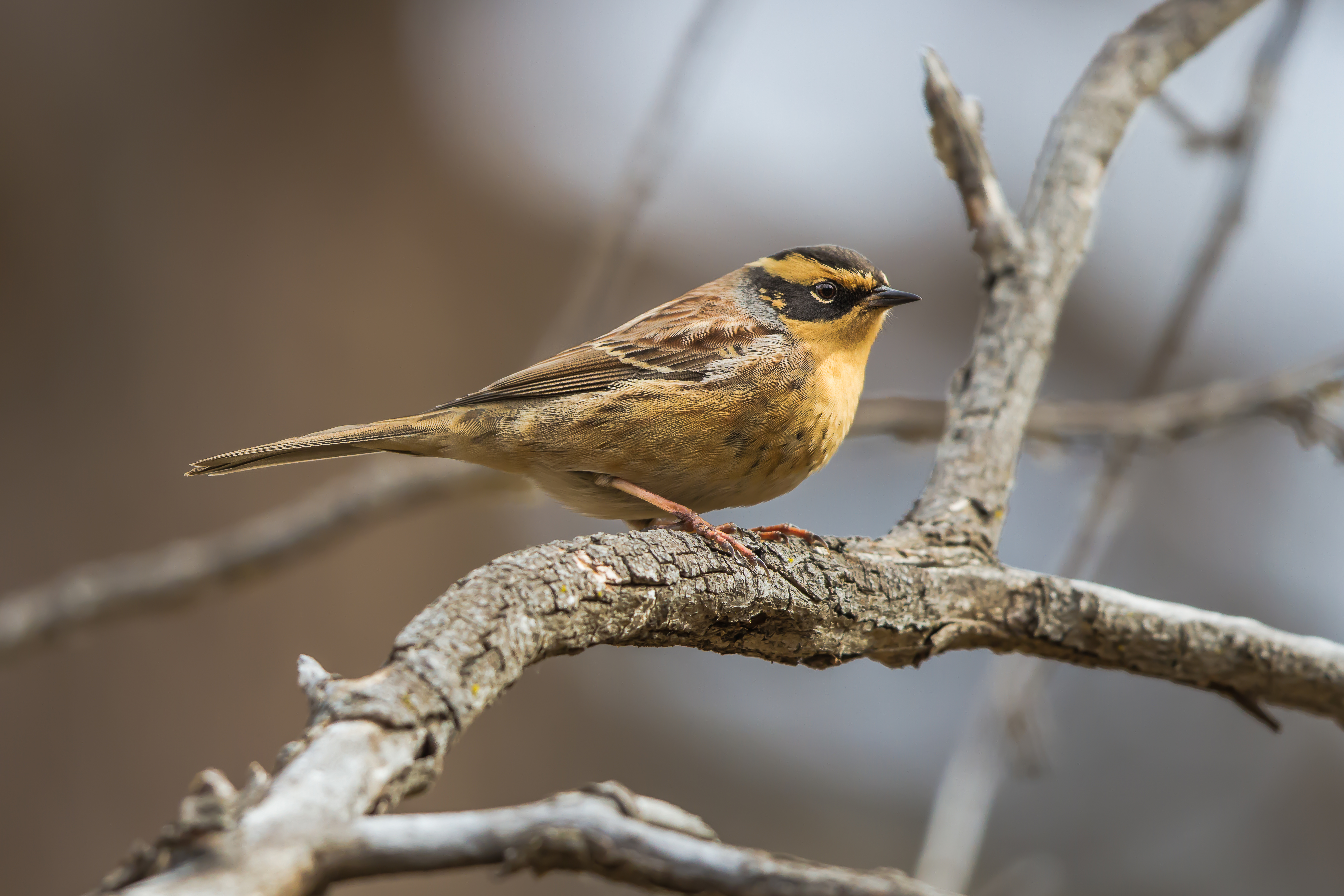 Siberian Accentor - Сибирийн хайруулдай Prunella montanella, Manzushir Monastery, Mongolia